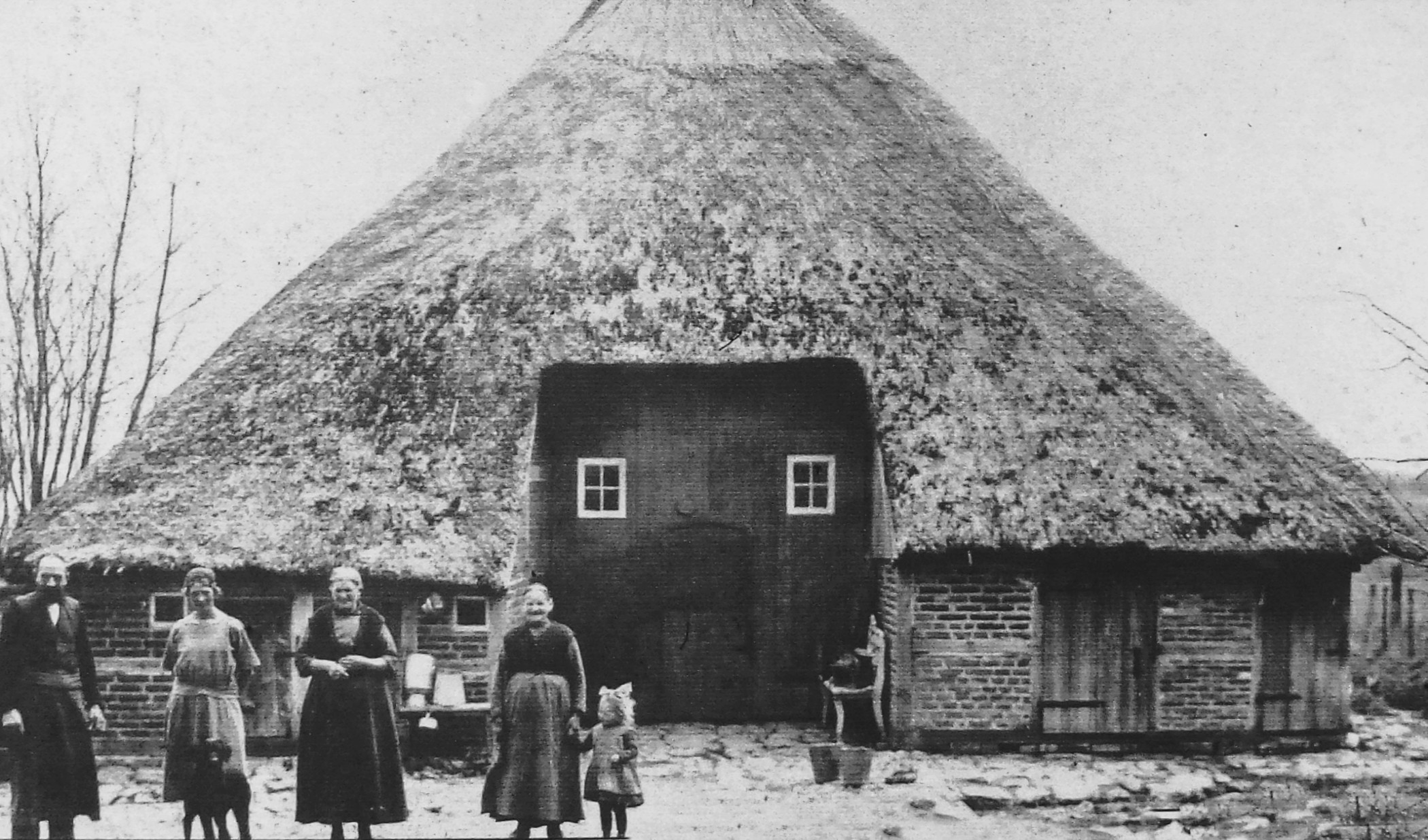 Döhnsdorf, Dorfstrasse, Hanswerkerhaus, Baujahr 1793